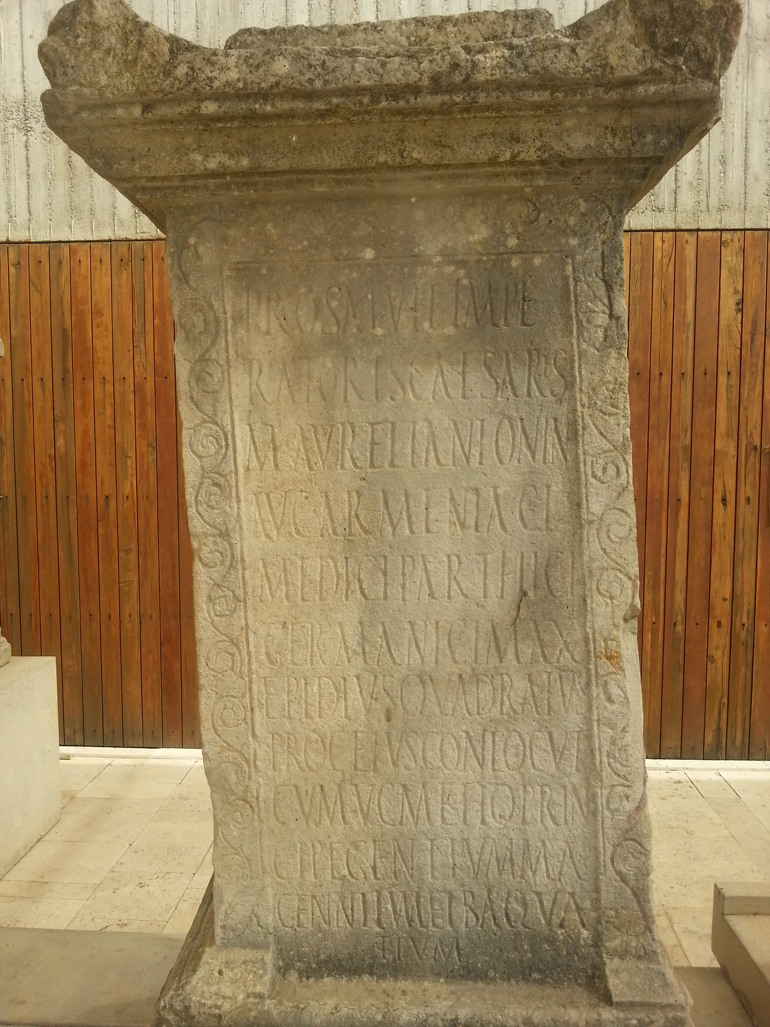 Altar de la paz encontrado en 1952 en el suburbio oeste de Volubilis, no lejos del canal. Se trata de un tratado de paz recordando que el gobernador de Tingitania concertado con Ucmetius, príncipe de los macenitas y de los bacuatas. Es el único texto epigráfico por el que conocemos la asociación temporal que unió las dos tribus [gentes] de la región de Volubilis.